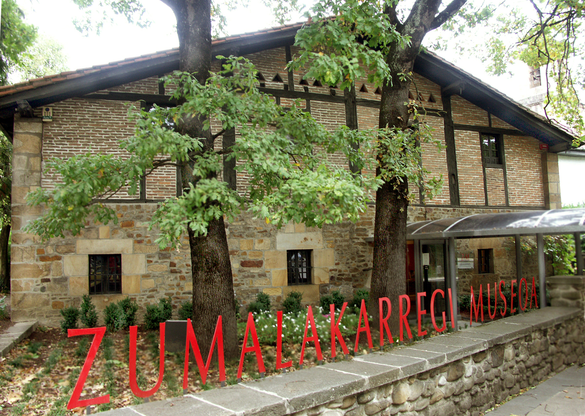 Zumalakarregi Museoaren sarrera. Info gehiago